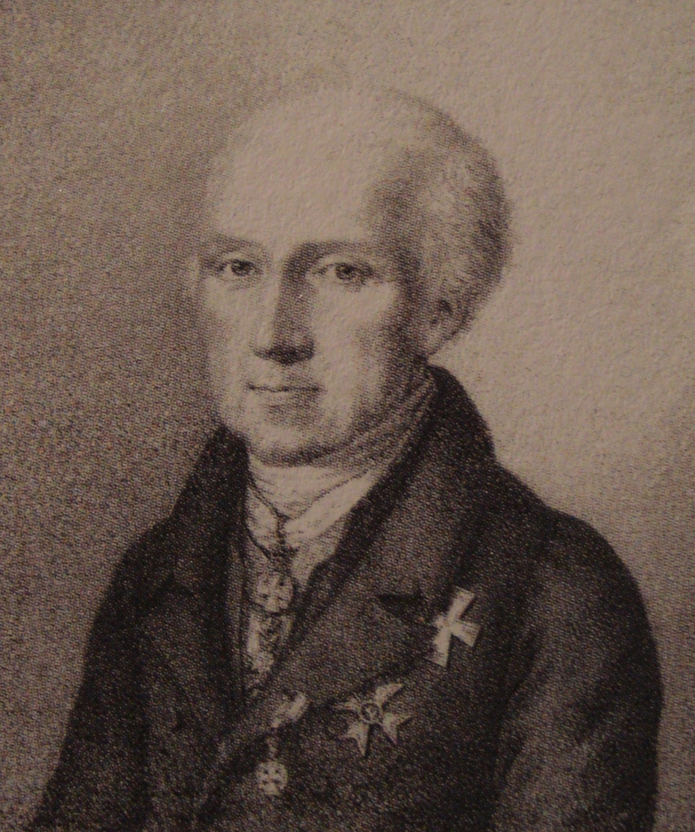 Bild von Johann Daniel Lawätz, gemalt von Carl Friedrich Kroymann